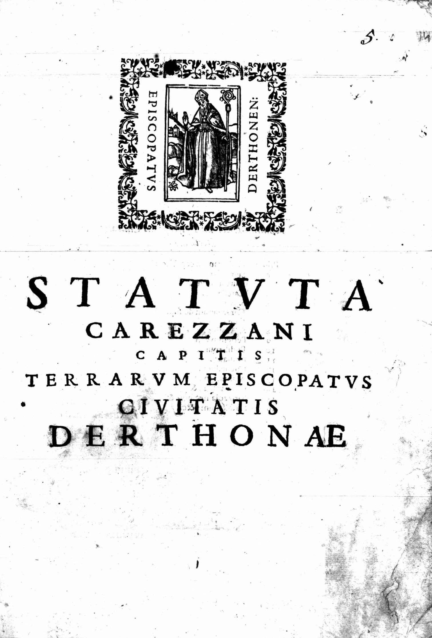 Frontespizio